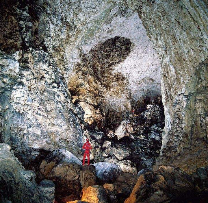 Foto risalente agli anni '80, quindi superiore a 20 anni e non soggetta a copyright